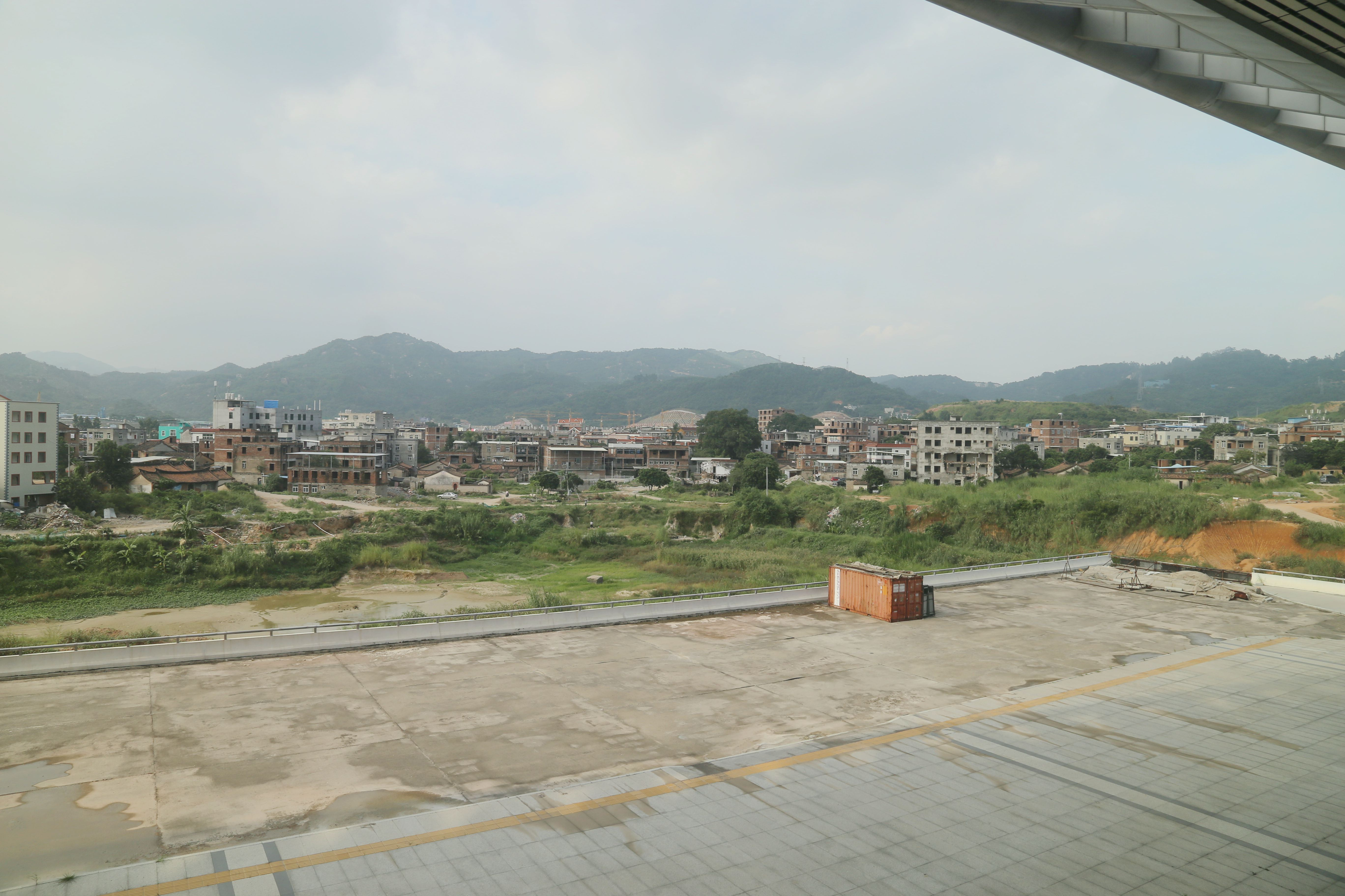 厦门北站北广场（未建成）